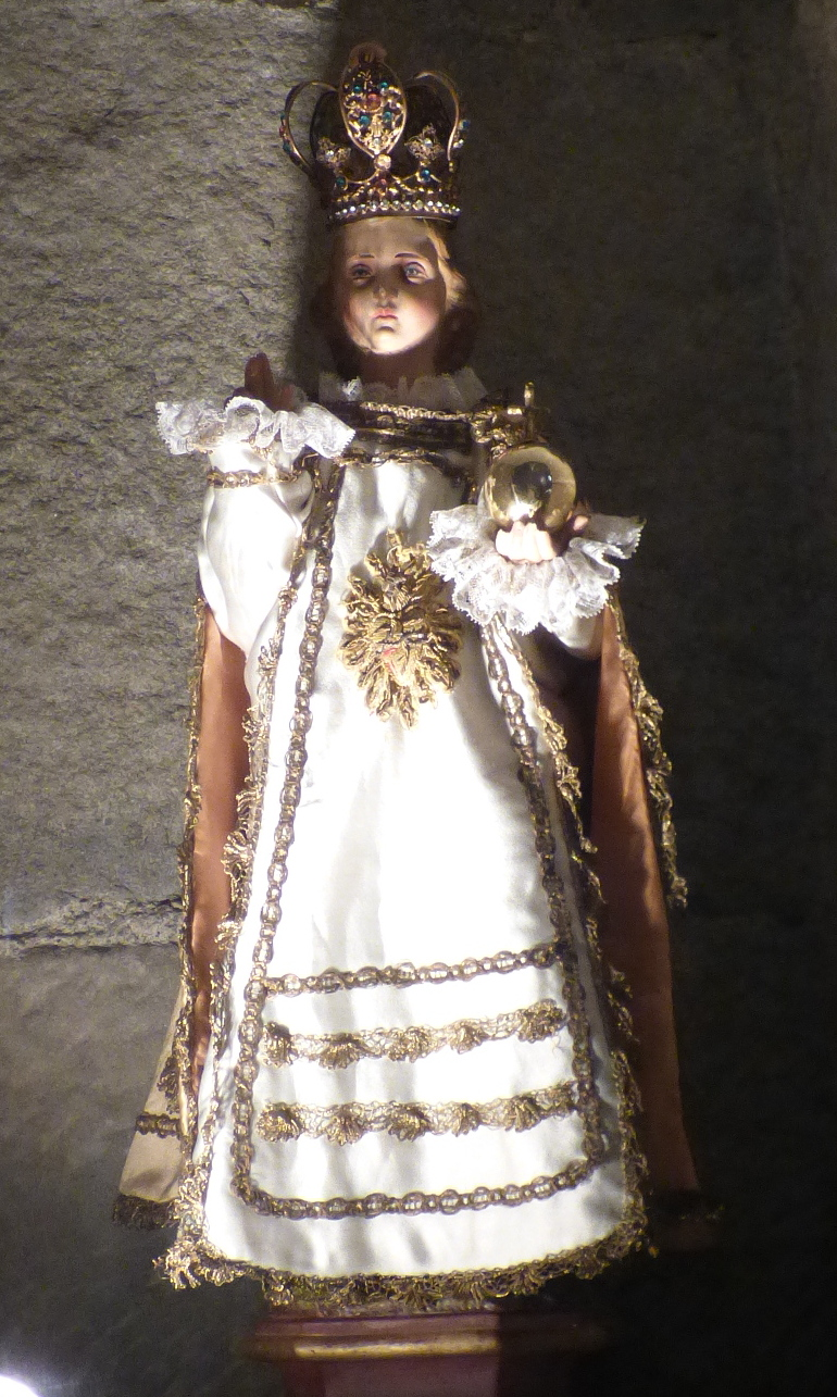 Enfant de Prague situé en l'église Ste Eulalie de Badens (Aude 2017)